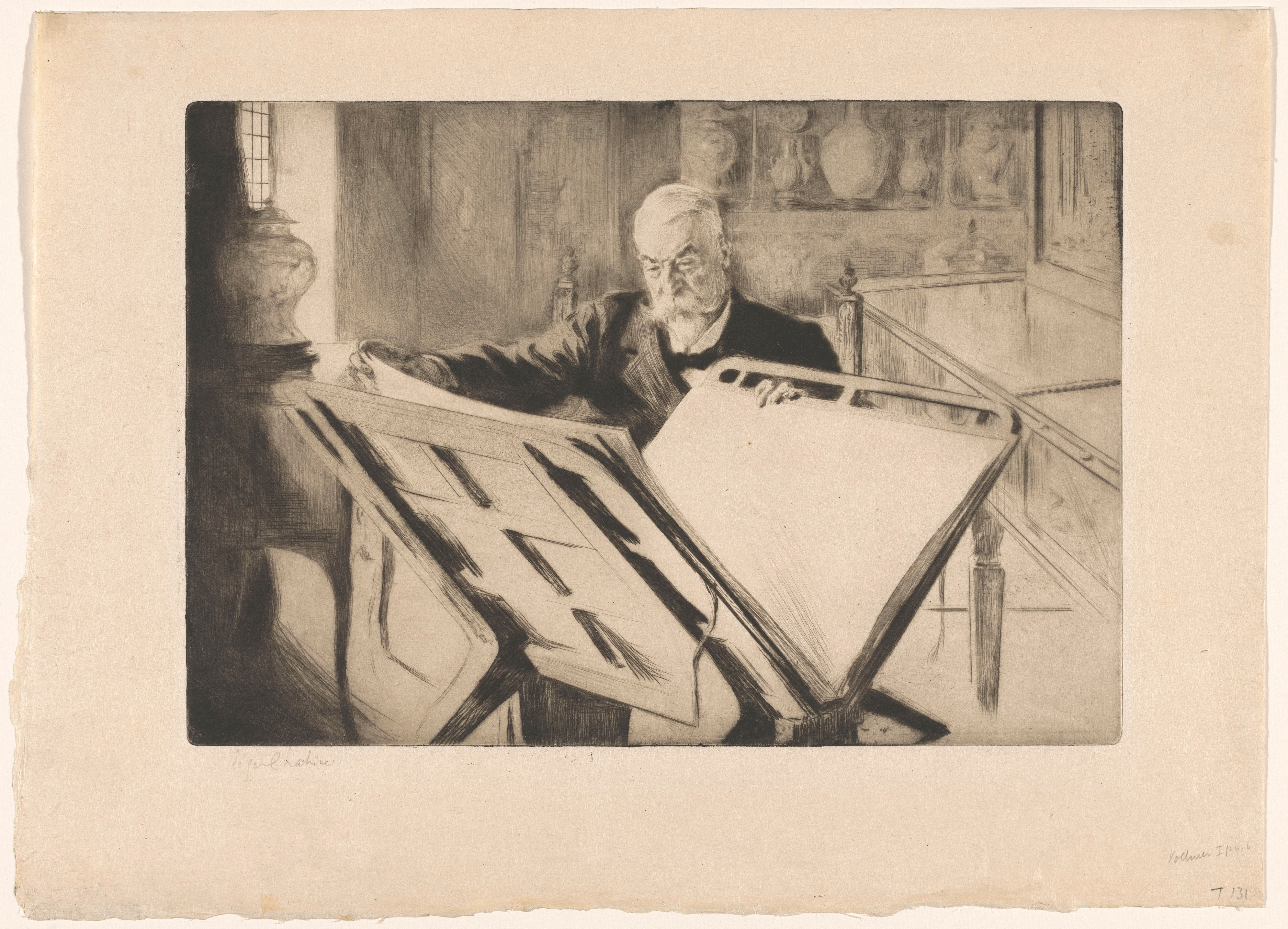 IdentificatieTitel(s): Portret van Henry GerbaultObjecttype: prent Objectnummer: RP-P-2015-26-739Opschriften / Merken: verzamelaarsmerk, verso, gestempeld: Lugt 2228verzamelaarsmerk, verso, gestempeld: Lugt 4779Omschrijving: De Franse kunstenaar Henry Gerbault zit op op een stoel achter een bok met prenten. In de achtergrond een vitrinekast en een wand met vazen.VervaardigingVervaardiger: prentmaker: Edgar Chahine (eigenhandig gesigneerd)Plaats vervaardiging: FrankrijkDatering: 1904Materiaal: papier Techniek: droge naald / plaattoonAfmetingen: plaatrand: h 220 mm × b 318 mmOnderwerpWat: portrait, self-portrait of artistWie: Henry GerbaultVerwerving en rechtenCredit line: Legaat van de heer S. Emmering, AmsterdamVerwerving: legaat 2000Copyright: Publiek domein